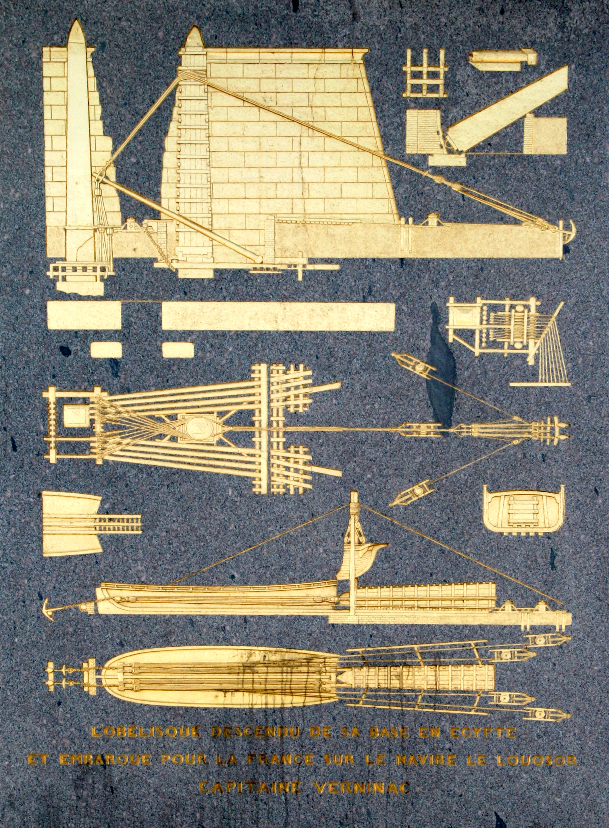 Détail de l'obélisque de la place de la Concorde à Paris